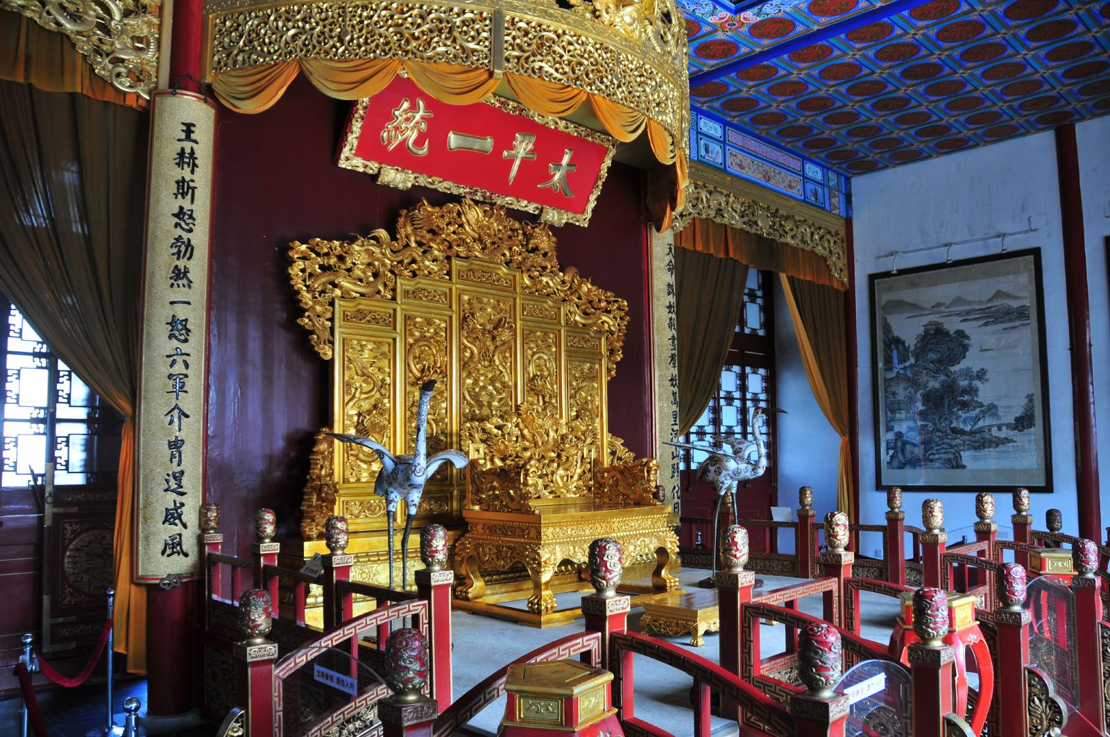 南京太平天国天王府复原场景